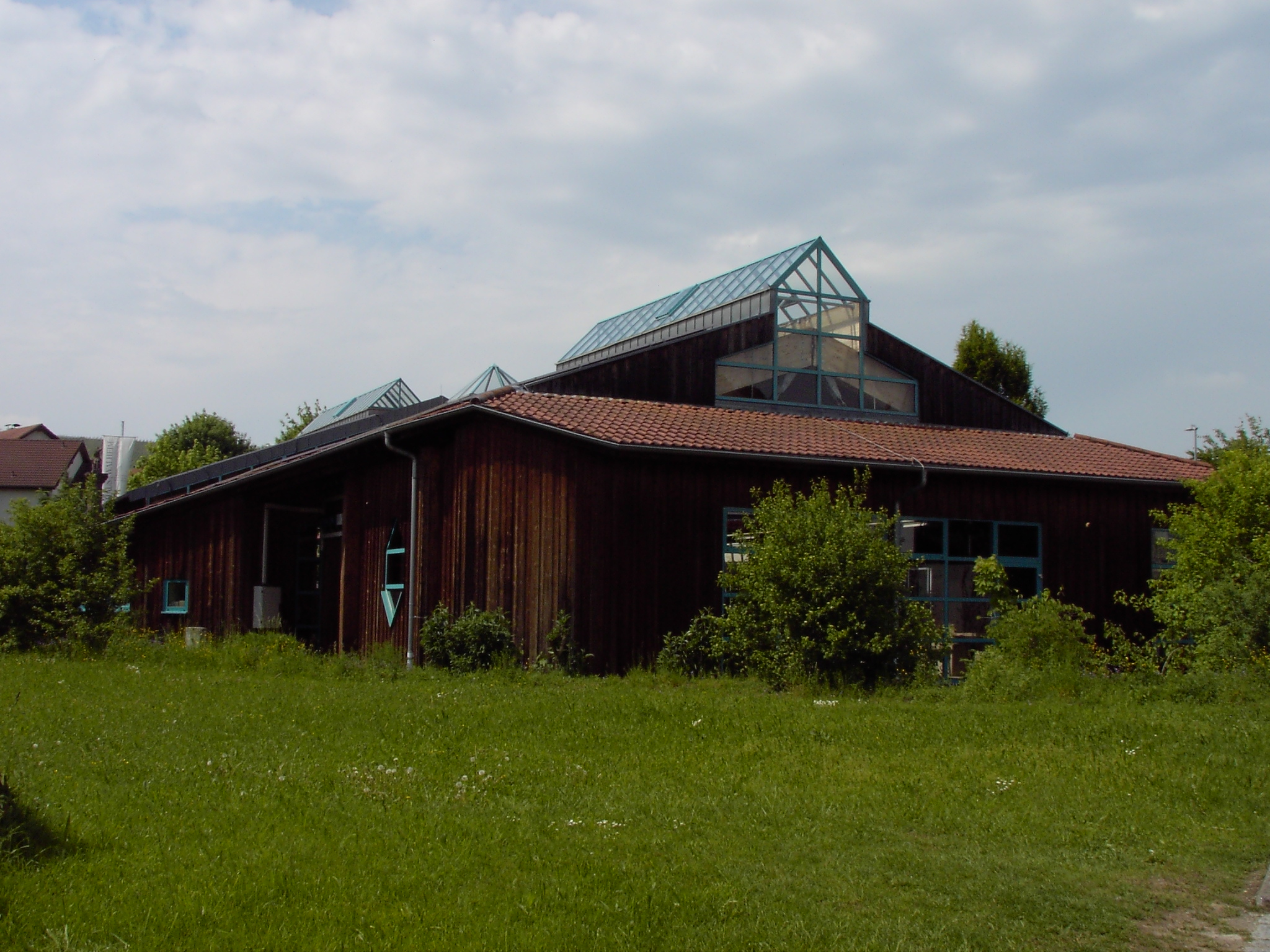 Das Schutzhaus des Römerhauses Walheim von der Ostseite